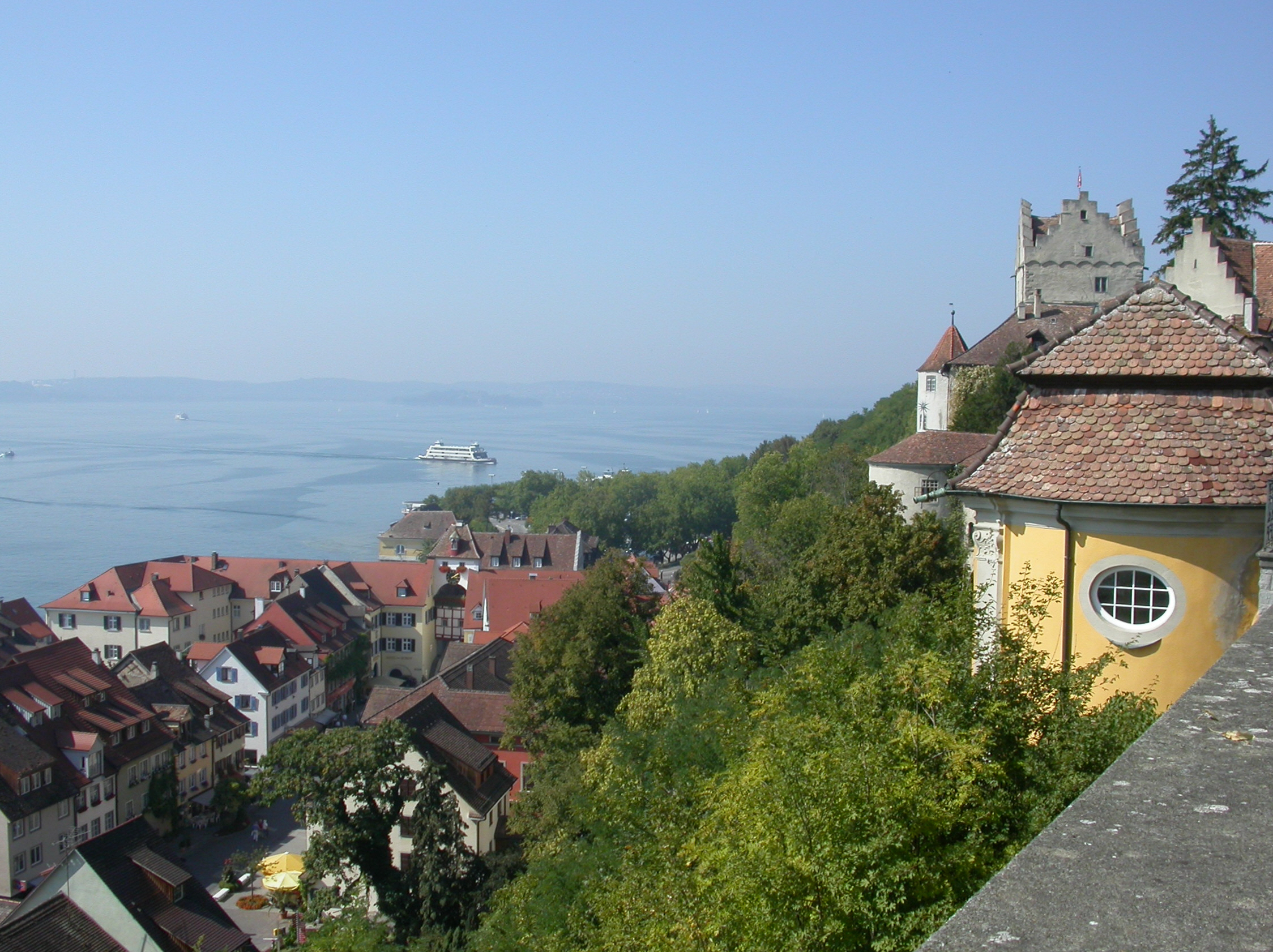 Blick auf Burg Meersburg (Altes Schloß) und Unterstadt